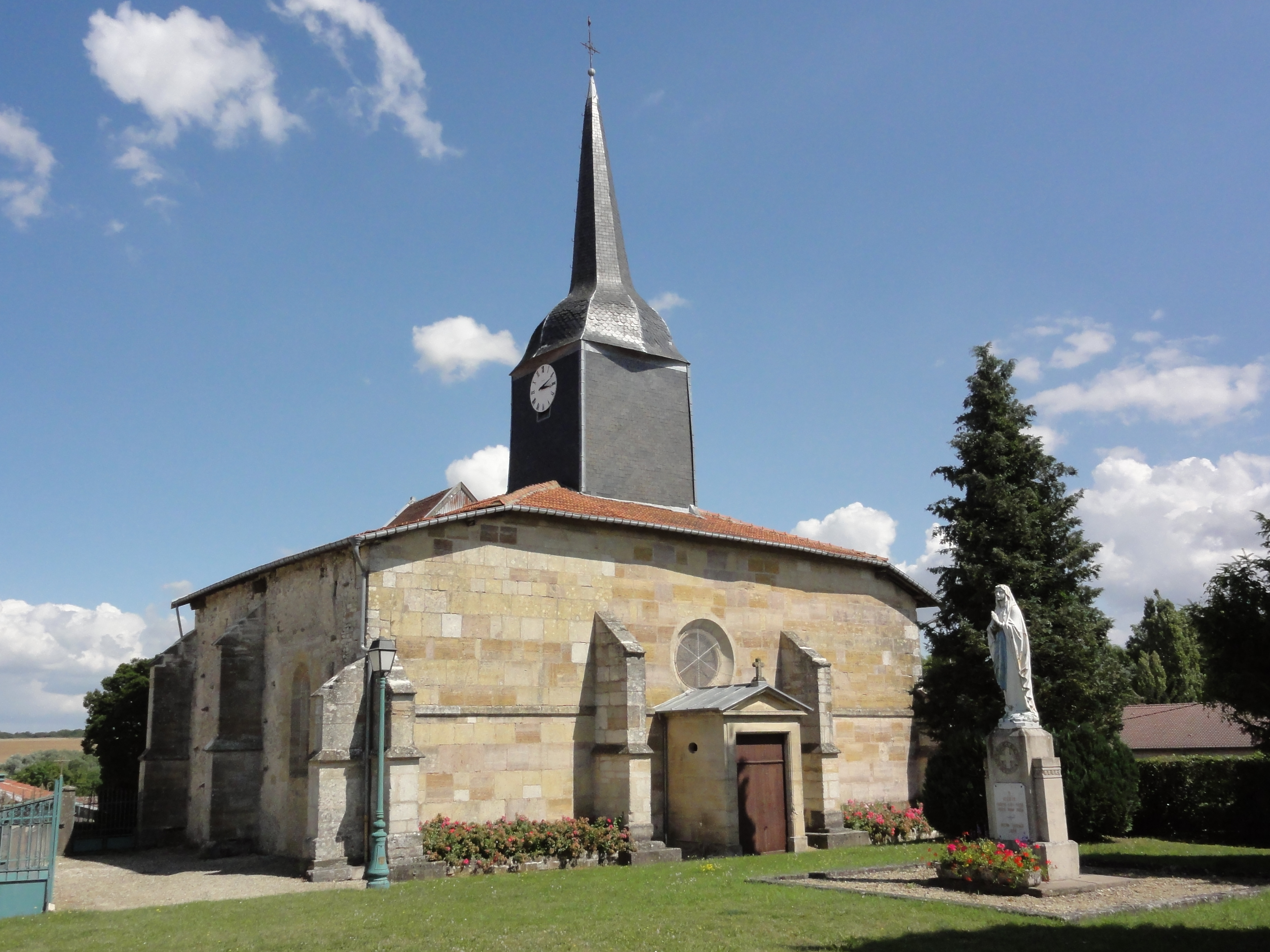 Érize-Saint-Dizier (Meuse) église